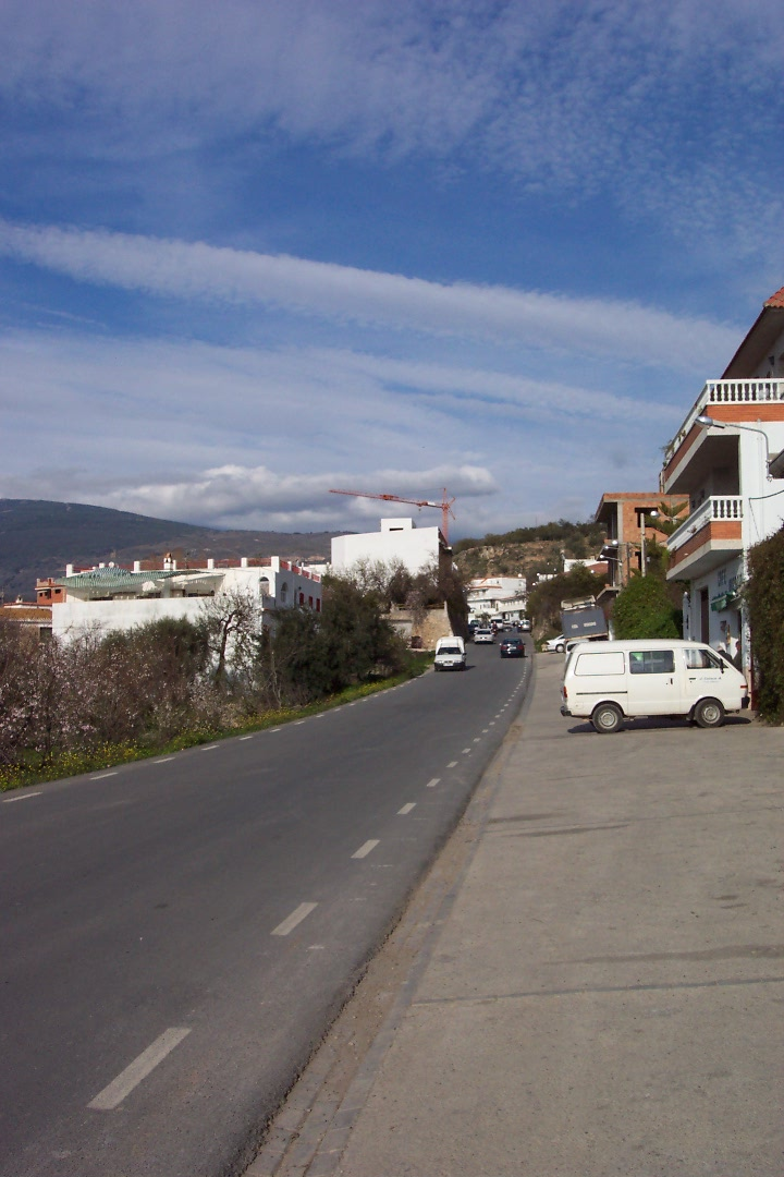 Carretera de entrada a Alcolea desde Almería Carretera de entrada a la población de Alcolea de Almería Fotografía realizada por José Manuel Escudero, febrero de 2003.